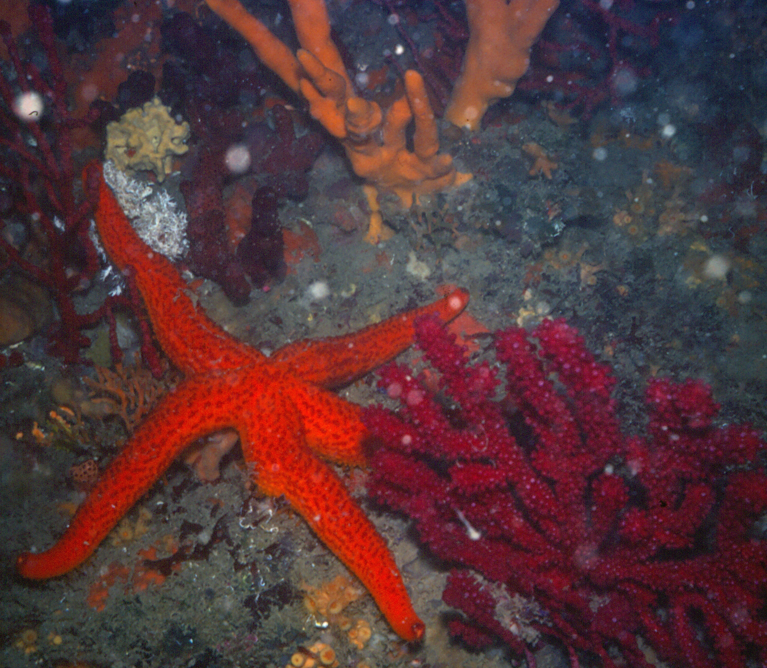 c'est l' étoile de mer la plus courante, qui malheureusement paie un lourd tribu avec les touristes. A noter que si l'étoile de mer venait à perdre un bras ou un bout de bras, celui-ci repousserait, c'est l'autotomisation.